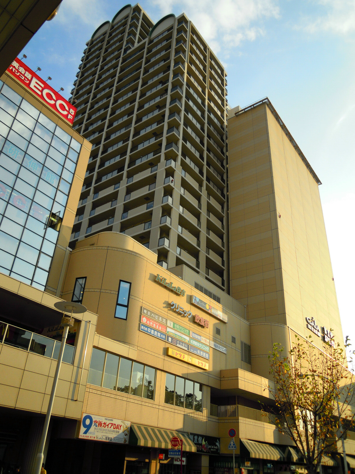 Sumiyoshi